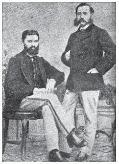 Андрей (? - 1897) и Константин Петкович (1924 - 1898).